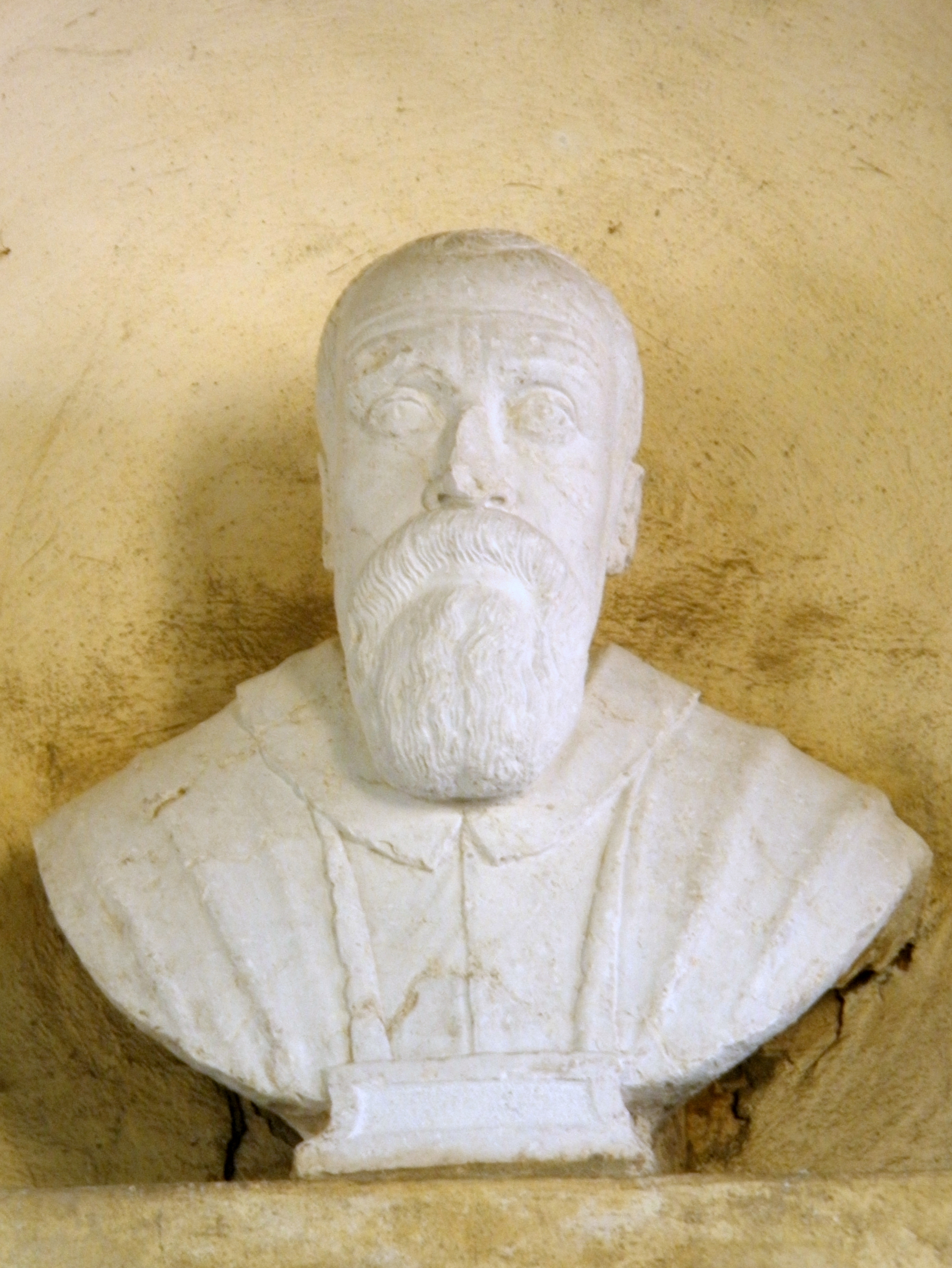 Rovigo, Chiesa della Beata Vergine del Soccorso detta "La Rotonda": busto posto sopra la lapide commemorativa dedicata ad Antonio Riccoboni murata all'esterno dell'edificio.